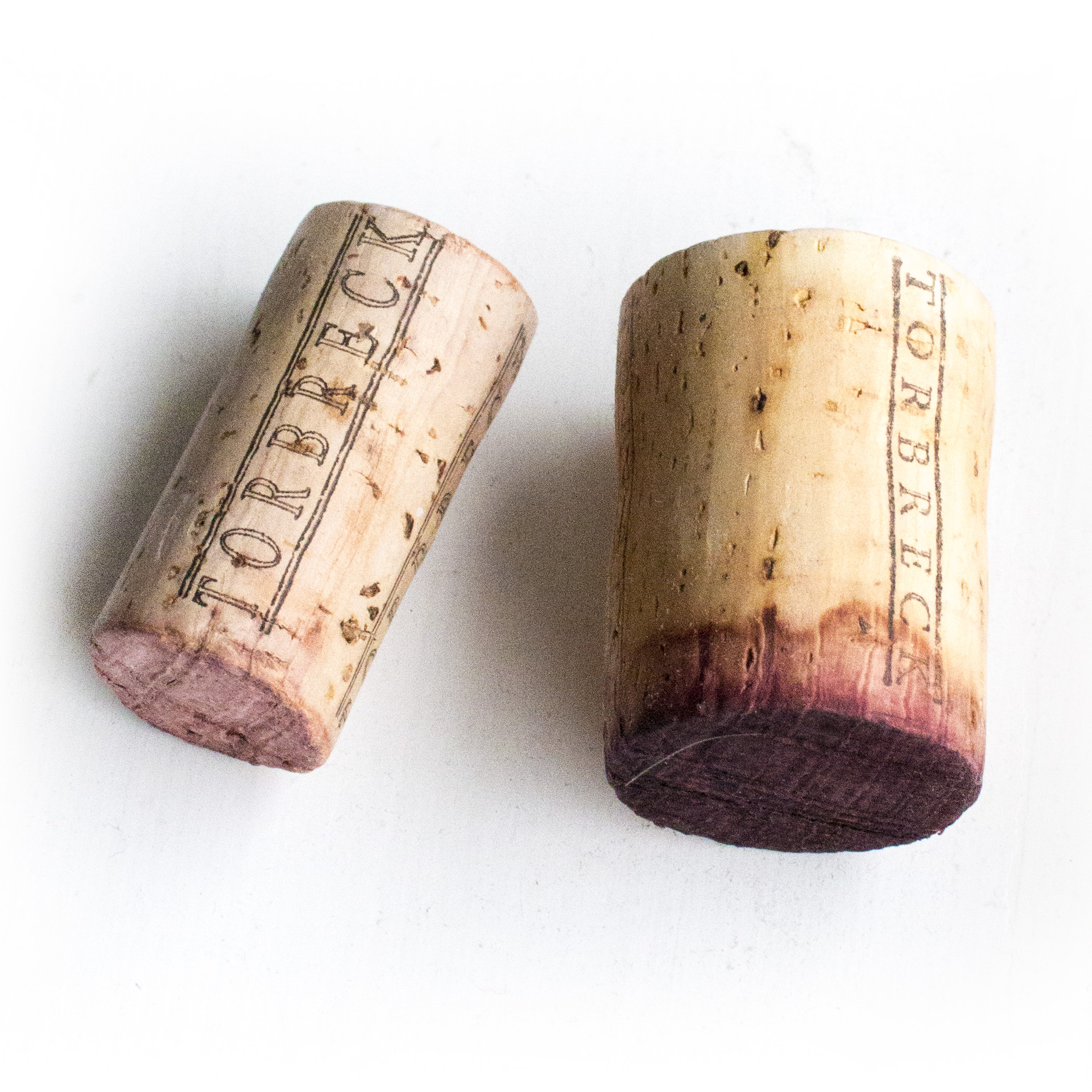 Pénétration du vin dans le bouchon